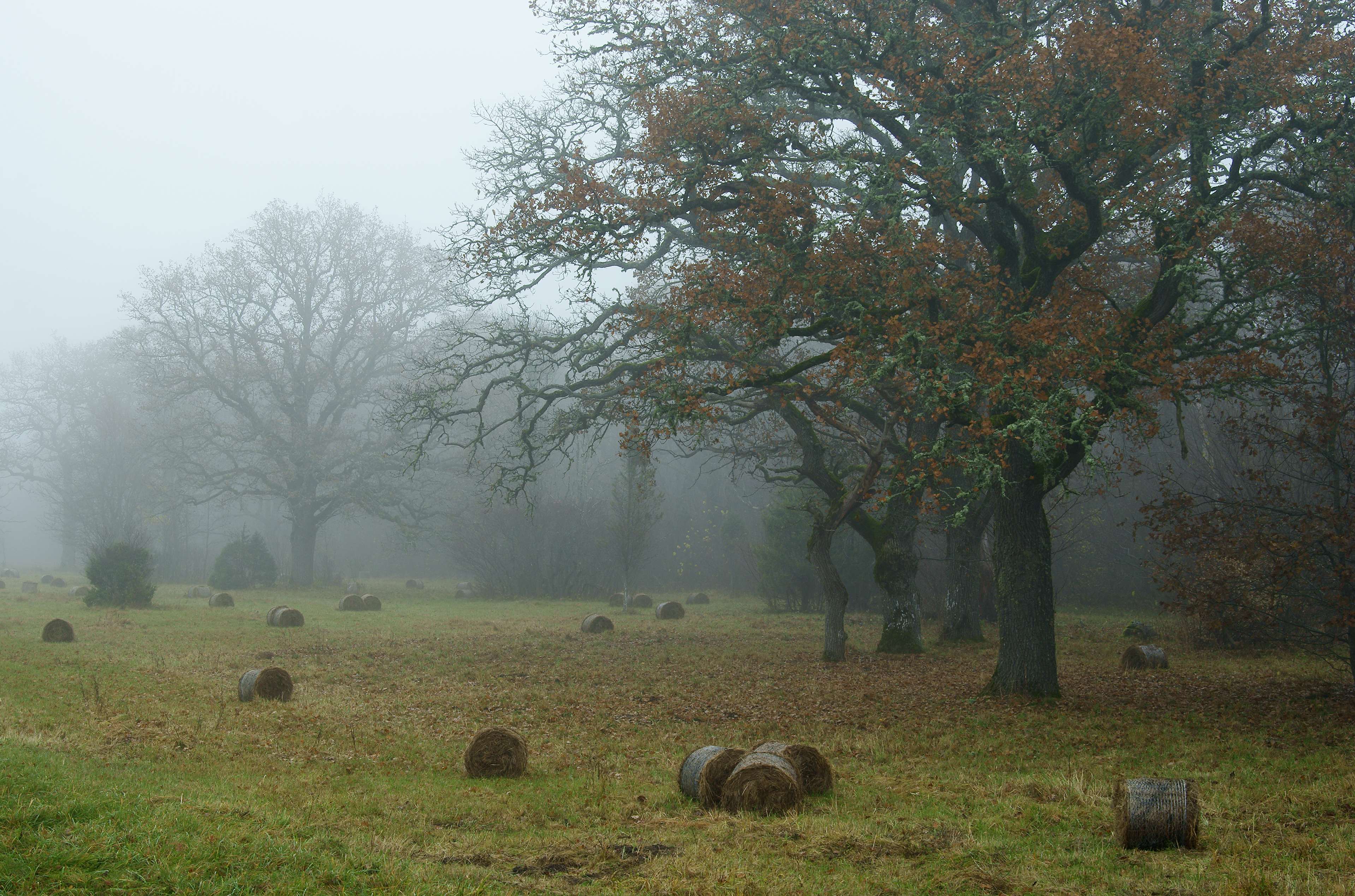 Loode tammik Saaremaal